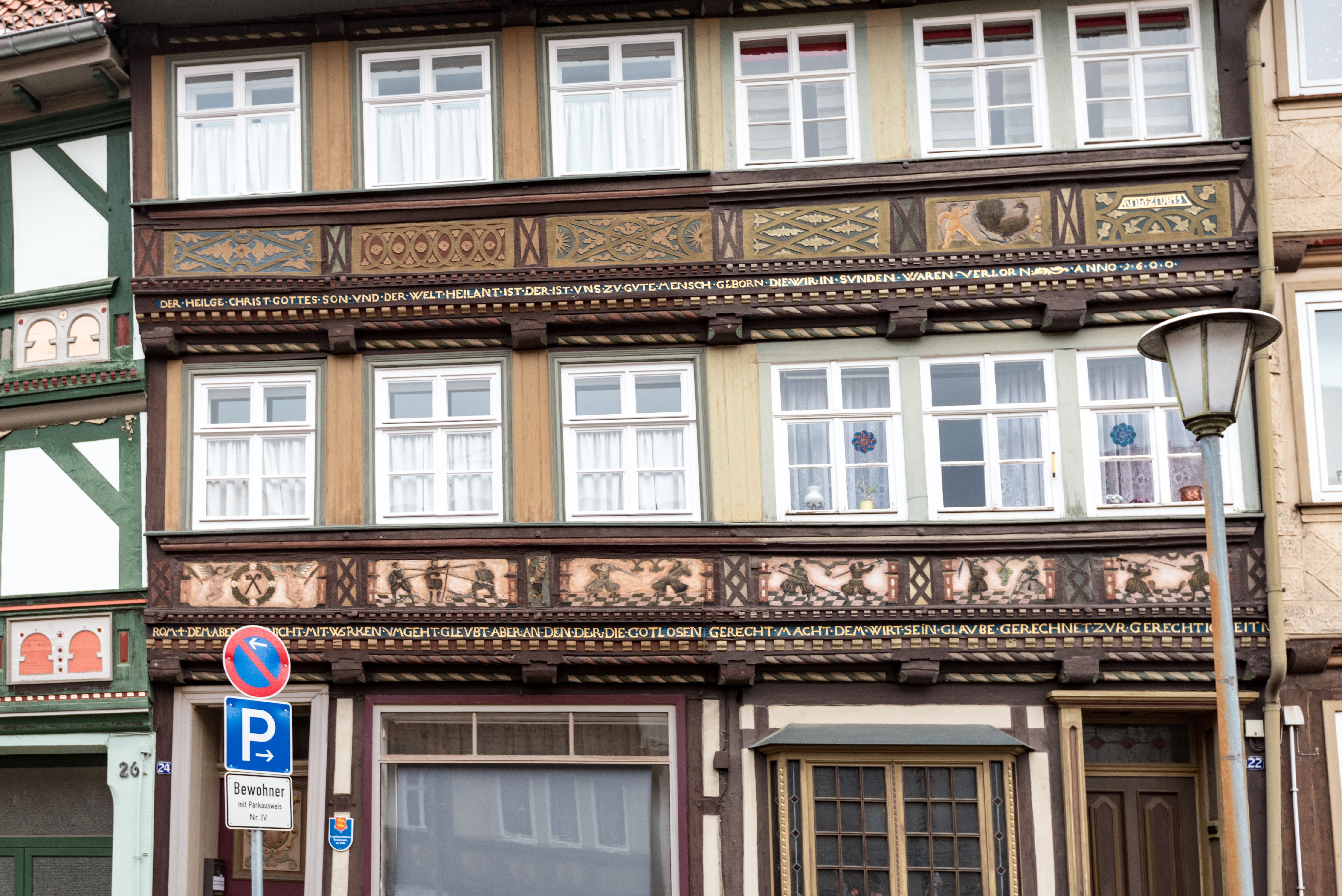 Duderstadt, Westertorstraße 22